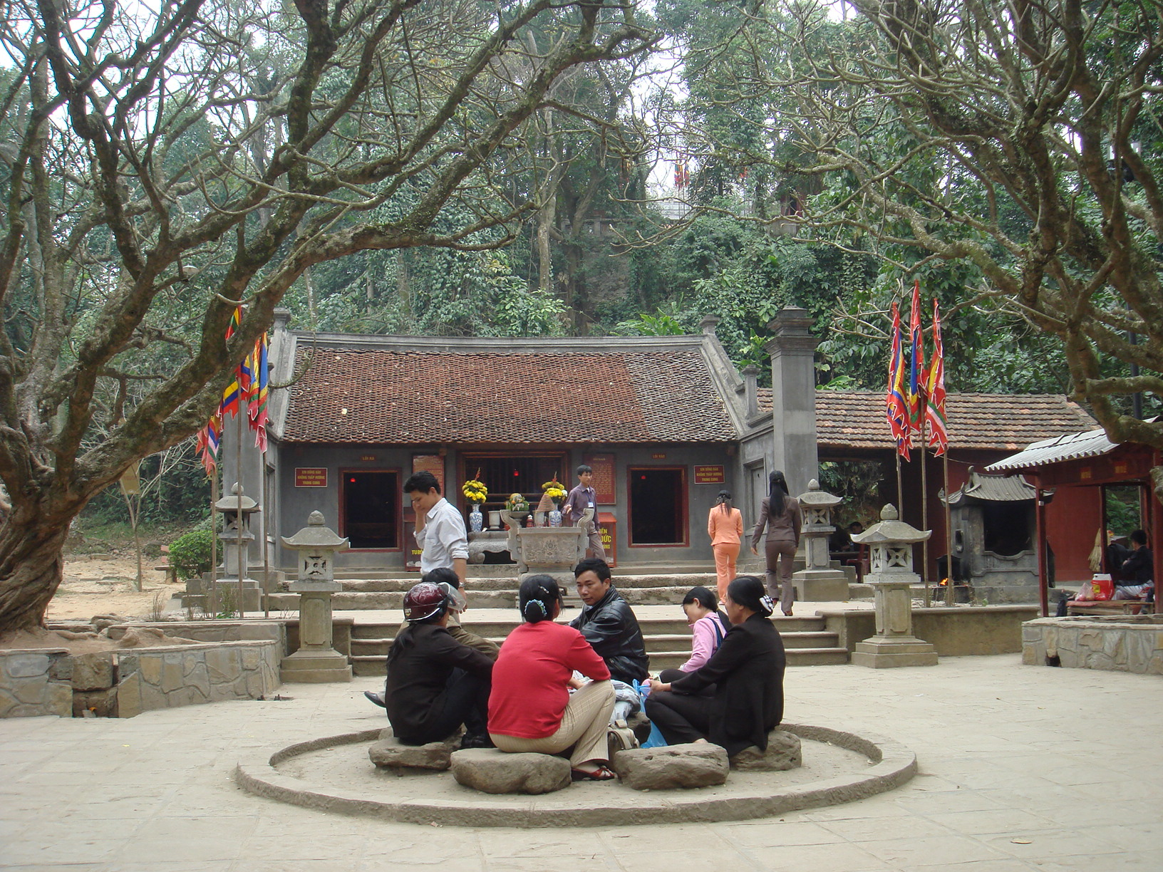 Đền Hùng